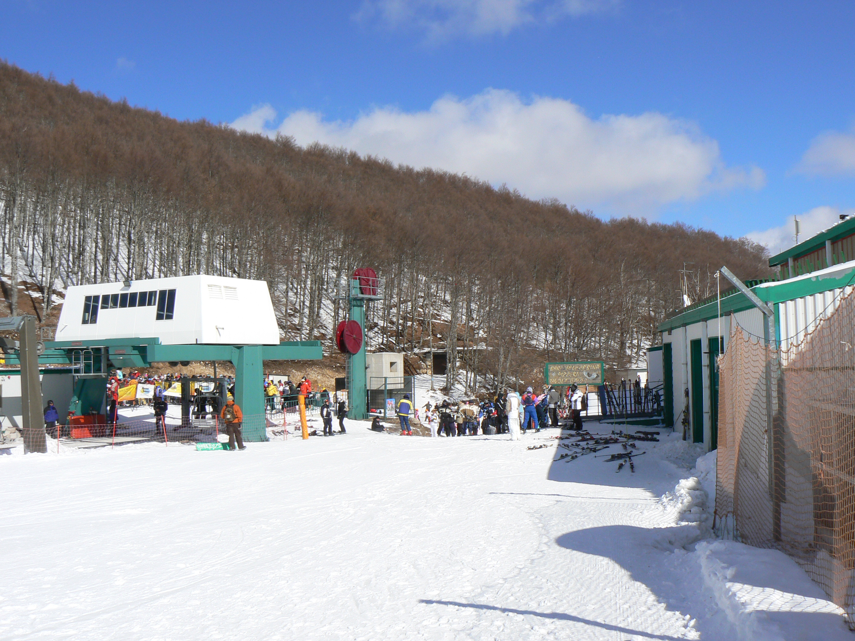 Pista di AREMOGNA